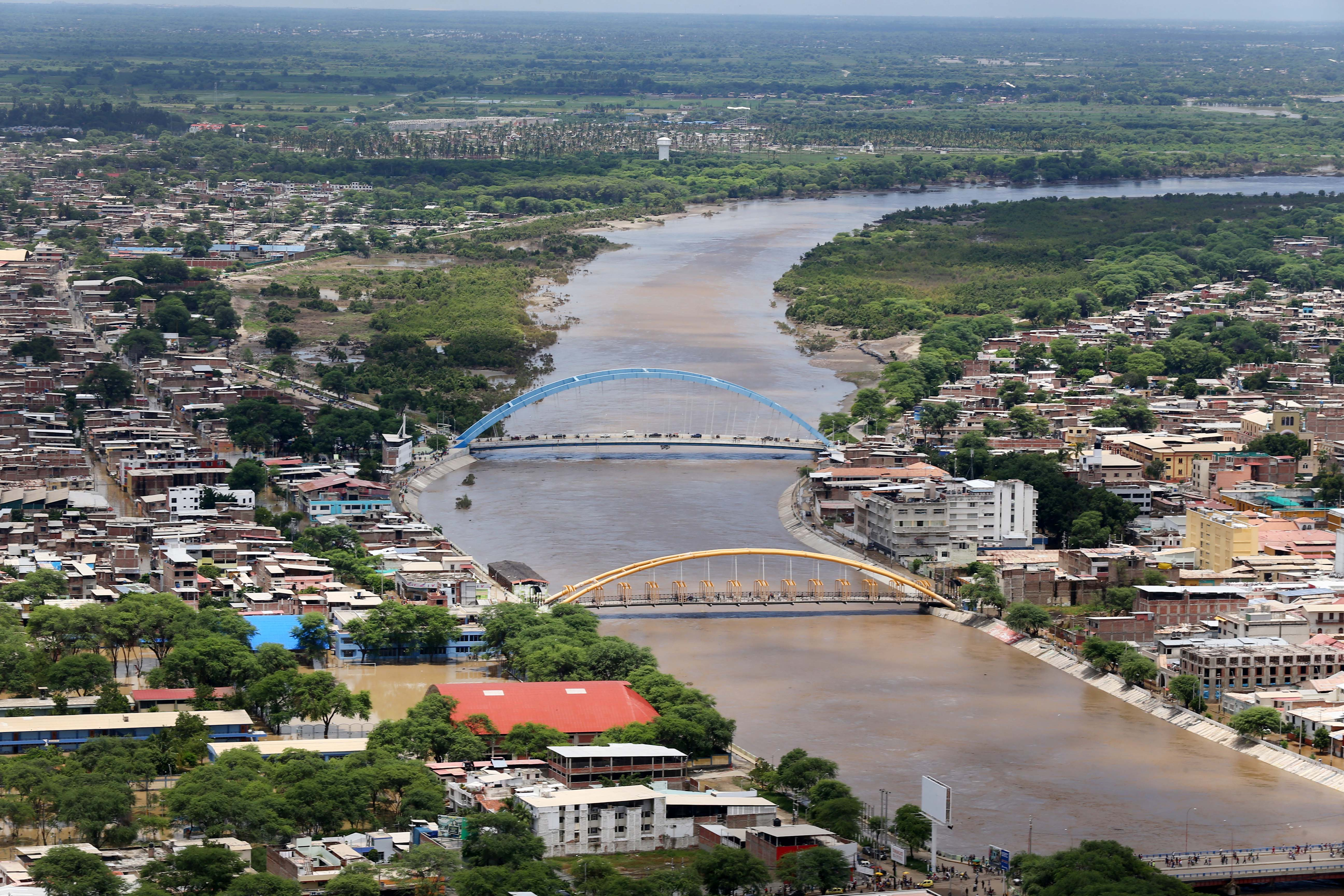 El Ministro de Defensa, Jorge Nieto Montesinos, viajó a Piura donde personalmente realizó las coordinaciones para la ejecución de las labores del sector Defensa y las Fuerzas Armadas ante la emergencia que azota la región.